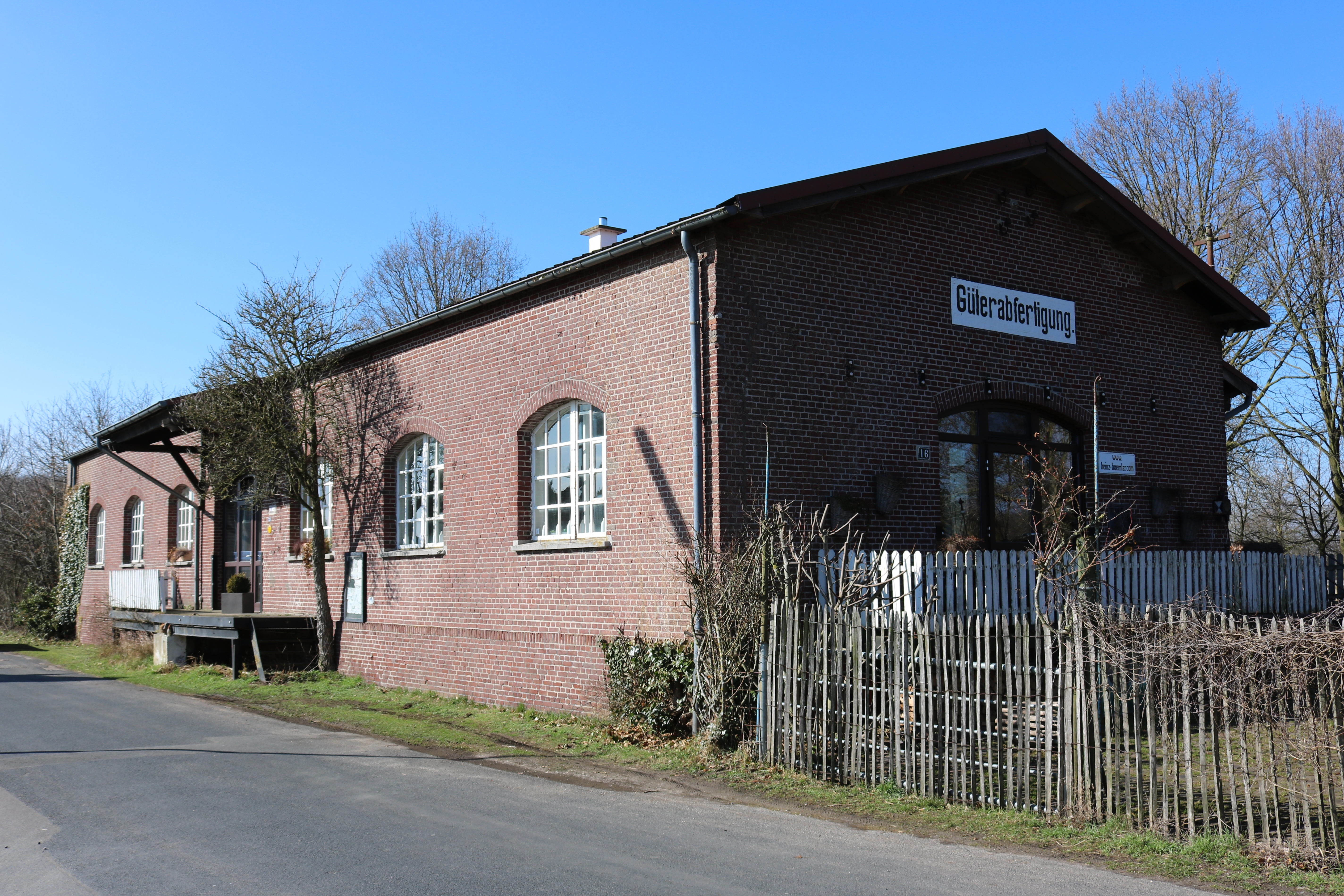 Bahnhof Hassum, Güterabfertigung (foto: Daniel van der Ree)